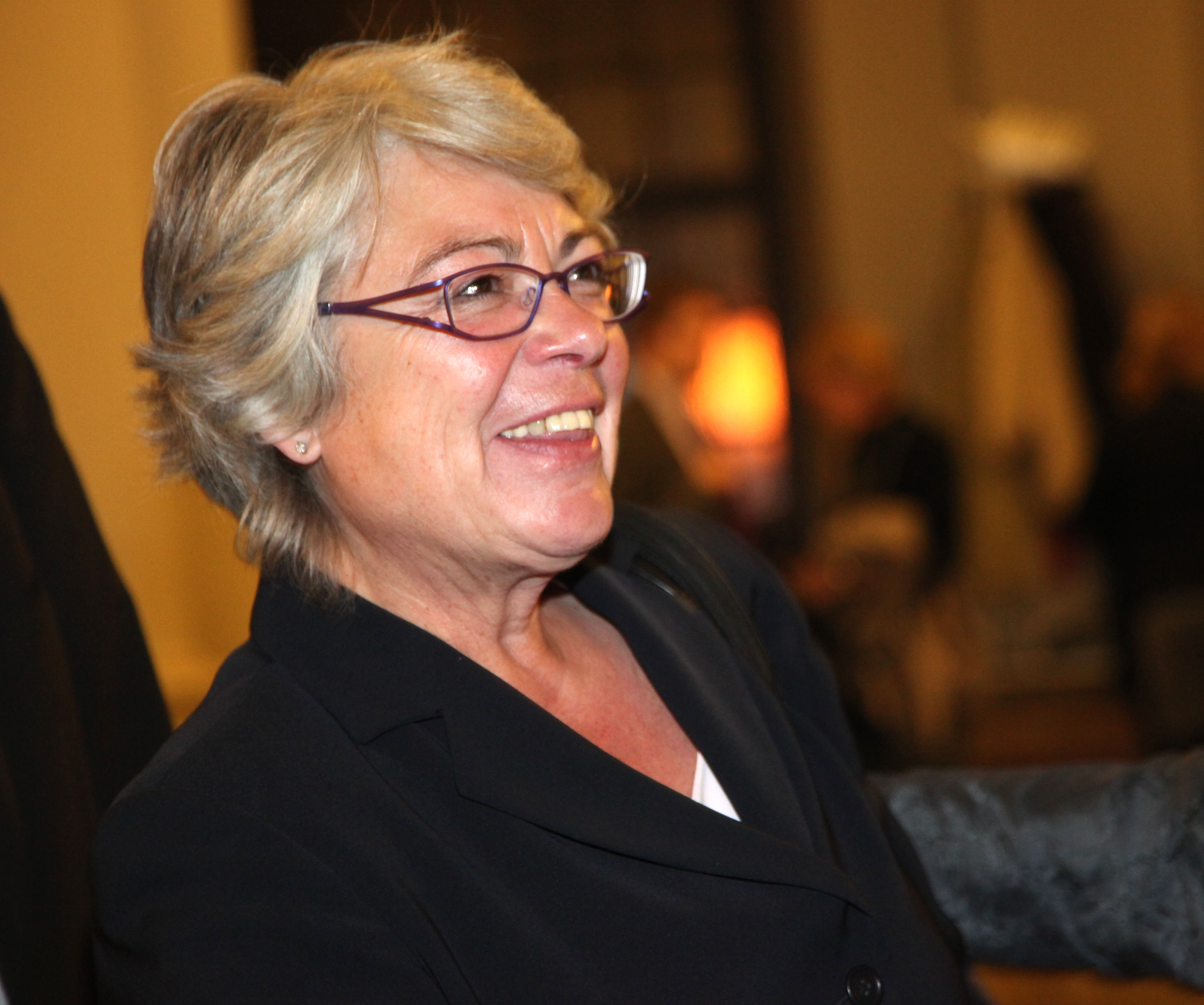 Sibylle Pfeiffer bei der Verleihung des Medienpreises "Goldener Kompass" am 29. September 2010 in Berlin